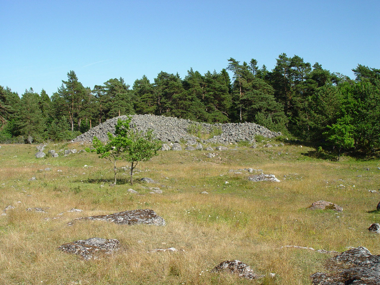 Gotland, Grabstätte Gålrum (über 100 Gräber, Ort:Gemeinde Alskog). Großer Grabhügel "Digerrojr" (Durchmesser 30m, Höhe 4m)